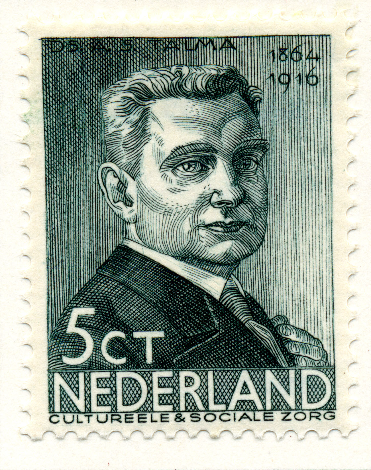 Zomerzegel (1936) met afbeelding van A.S. Talma. Ontwerp van Engelien Reitsma-Valença